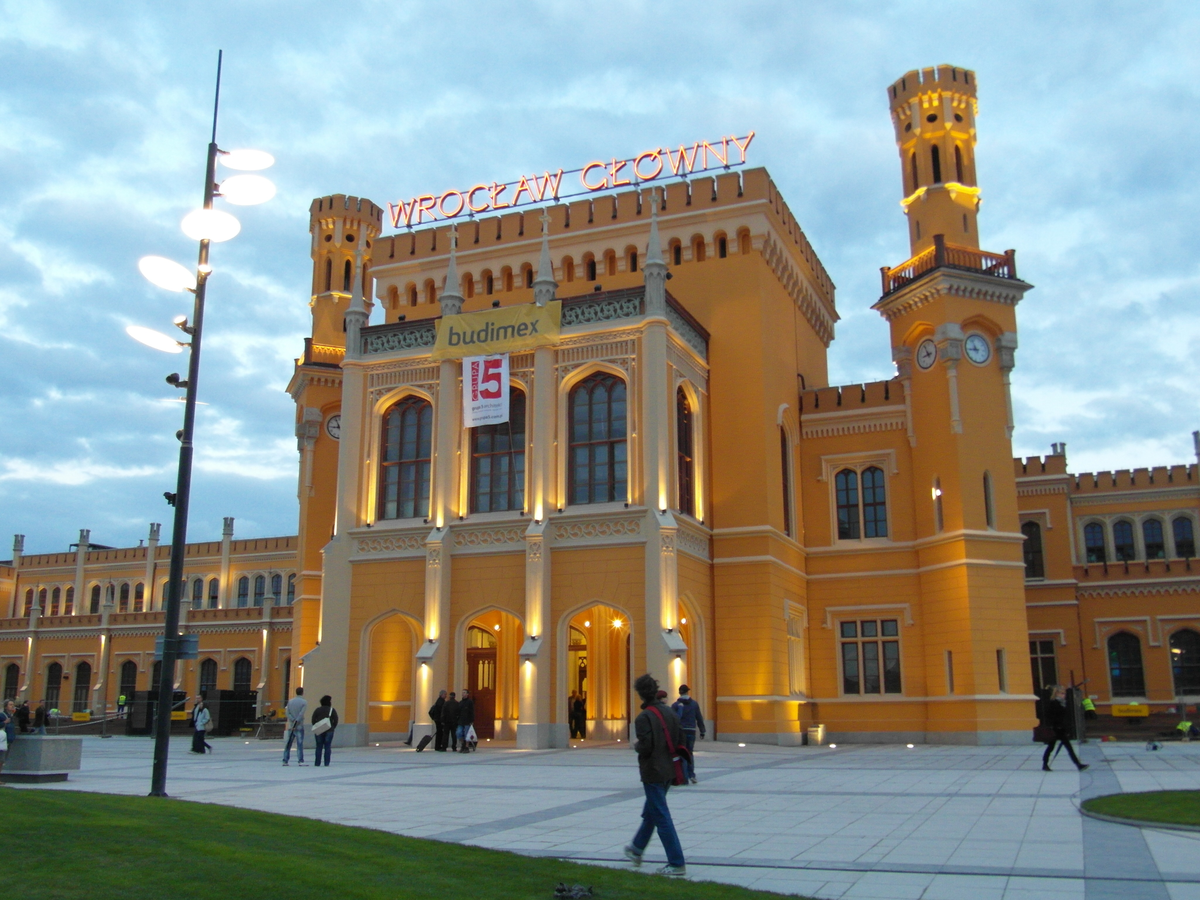 Wrocław - Dworzec Główny - stan po modernizacji 05/2012 Breslau - Hauptbahnhof - Stand nach Abschluss der Modernisierung - 05/2012